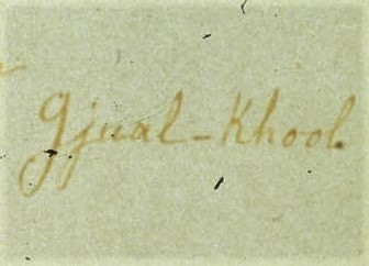 Firma di un maestro della teosofia che si faceva chiamare Djwal Khul, e qui apposta come «Gjual-Khool».